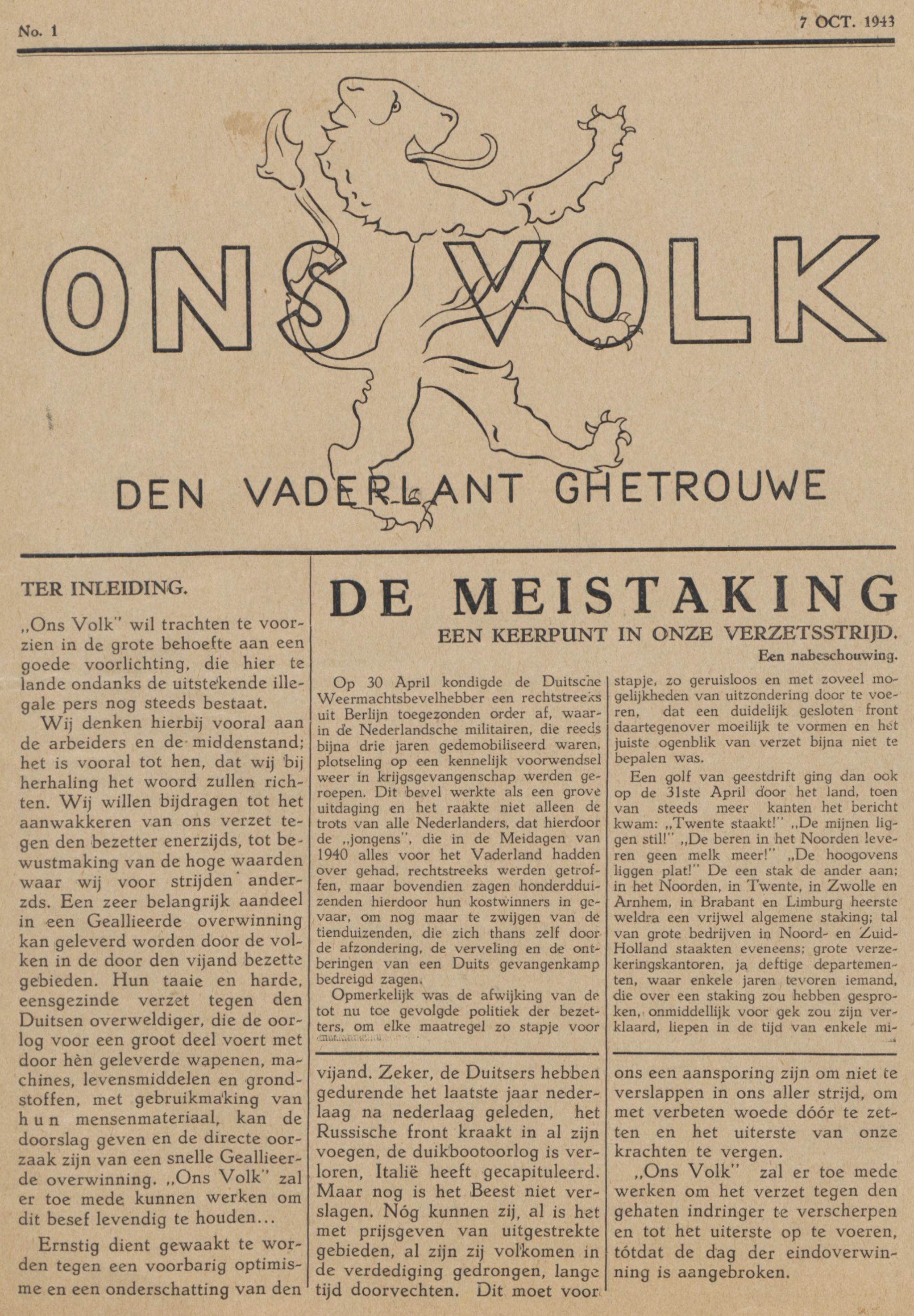 Verzetsblad 'Ons Volk' van 7 oktober 1943.